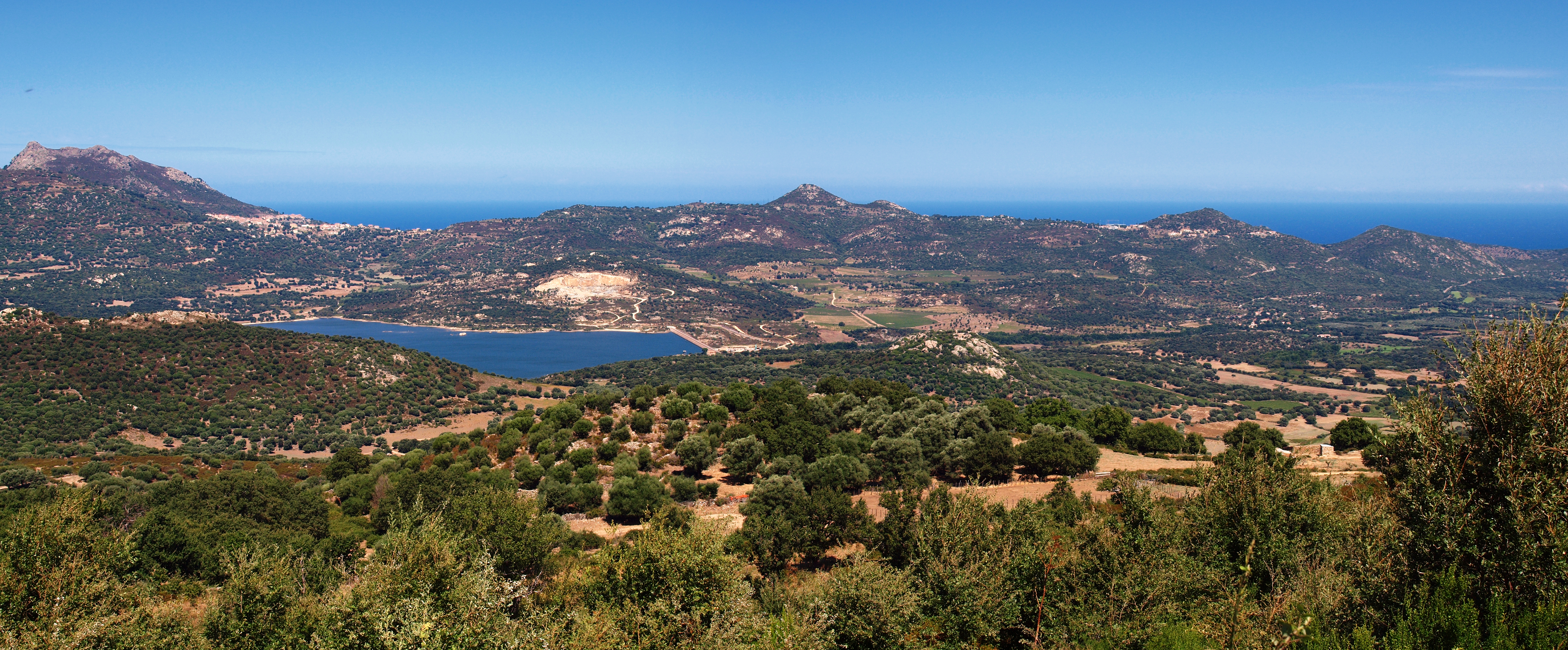 Speloncato (Corsica) - Panorama sur la plaine du Regino et le lac de Codole